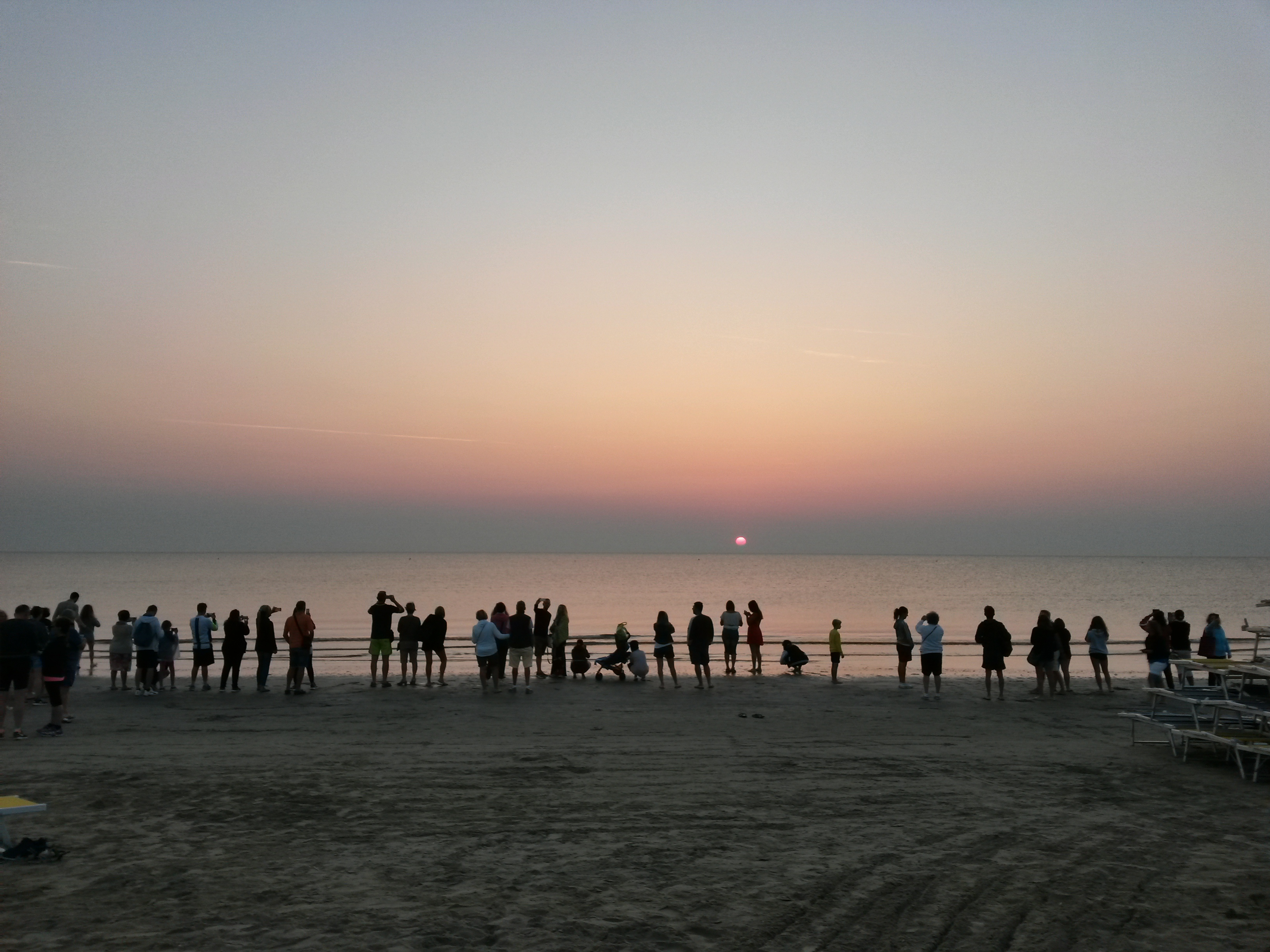 Albe musicali sulla spiaggia di Pinarella per vedere sorgere il sole sul mare